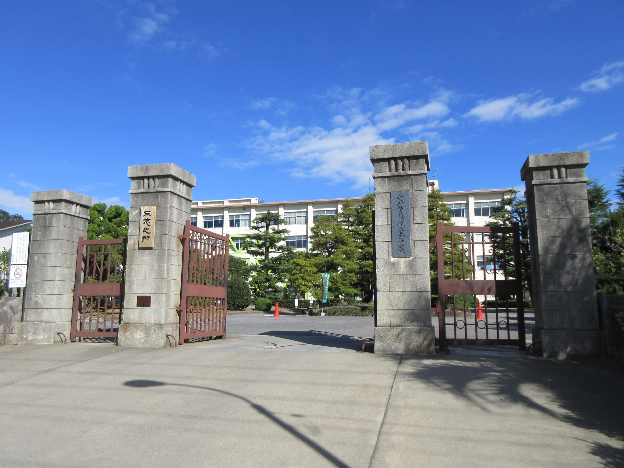 愛知県立鶴城丘高等学校（愛知県西尾市）